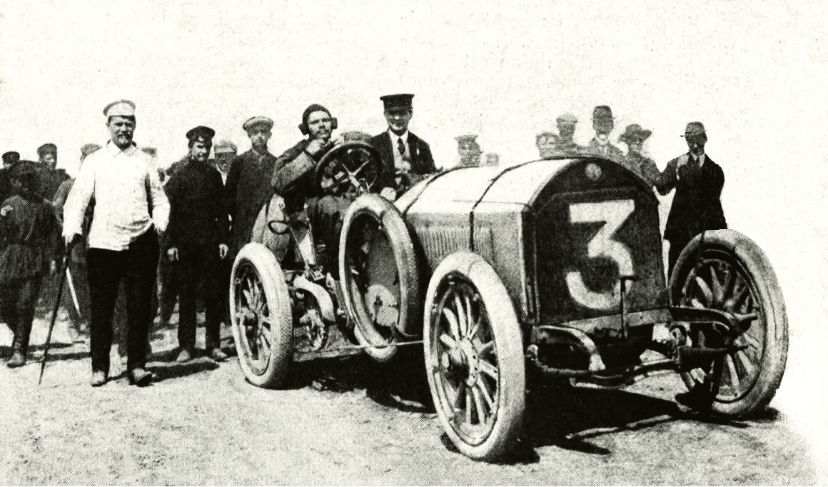 Victor Hémery, vainqueur de Saint-Petersbourg-Moscou 1908 (2e édition) - La Vie au Grand Air - 20 juin 1908, p.395